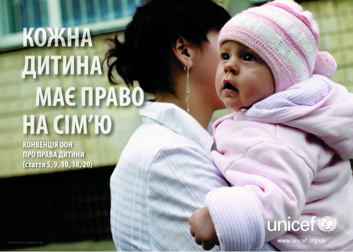 плакат про права дытей